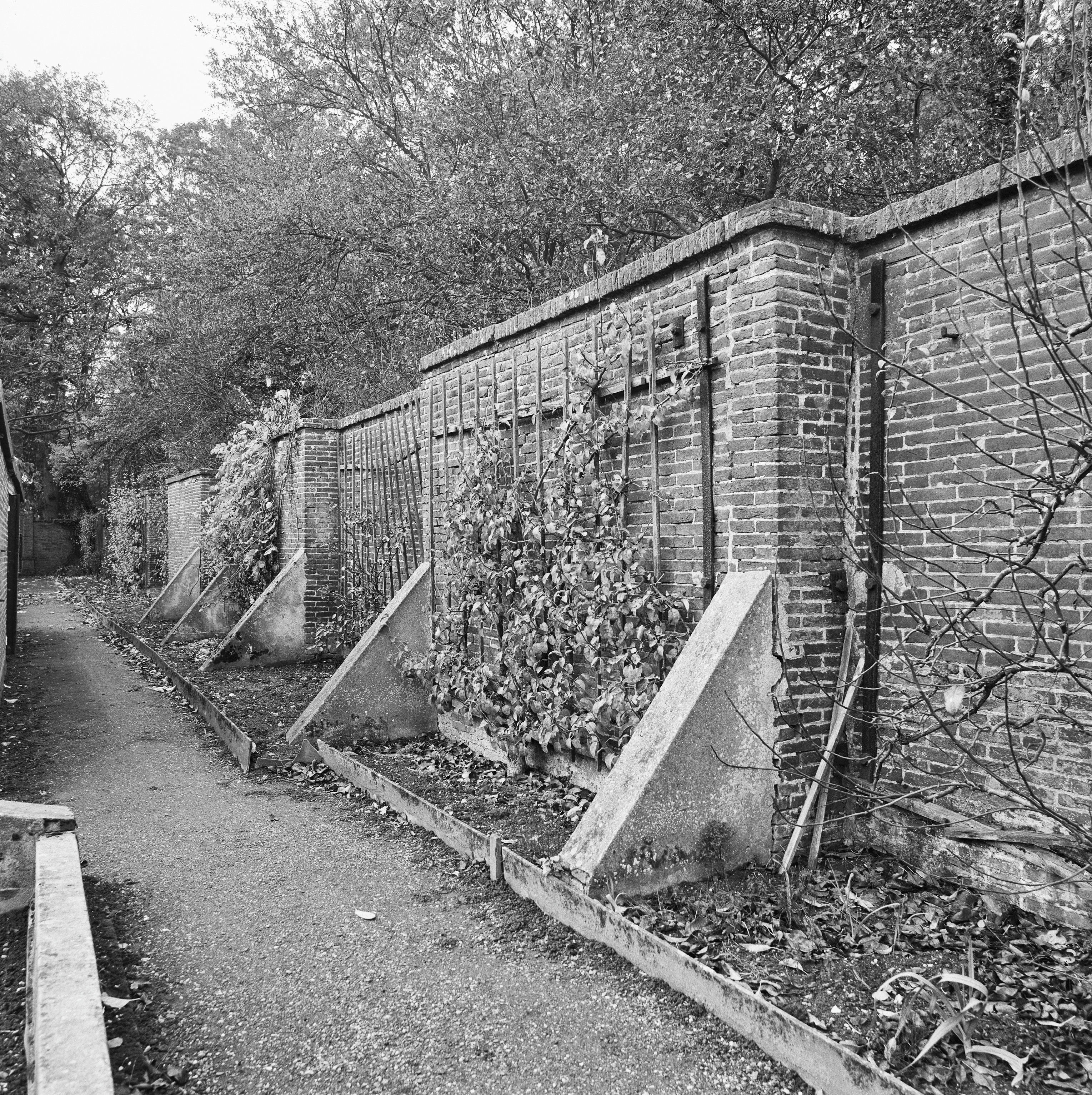 Aan de noord- en oostzijde van park Queekhoven gelegen meandermuur uit het tweede kwart van de 18de eeuw, in Breukelen